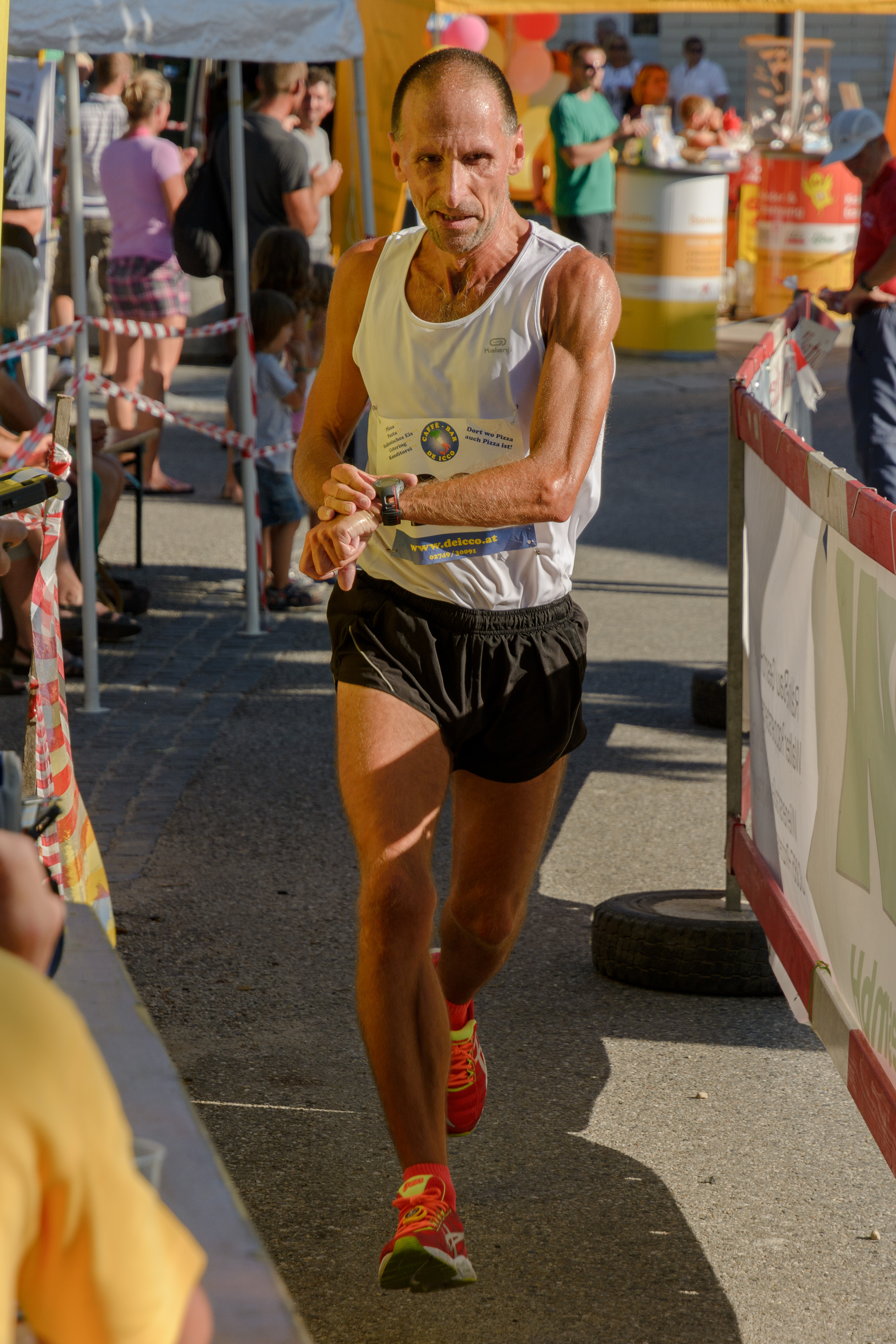 Der bekannte Politikwissenschaftler beim Zieleinlauf des Markersdorfer Marktlaufes. Er erreichte den vierten Platz.